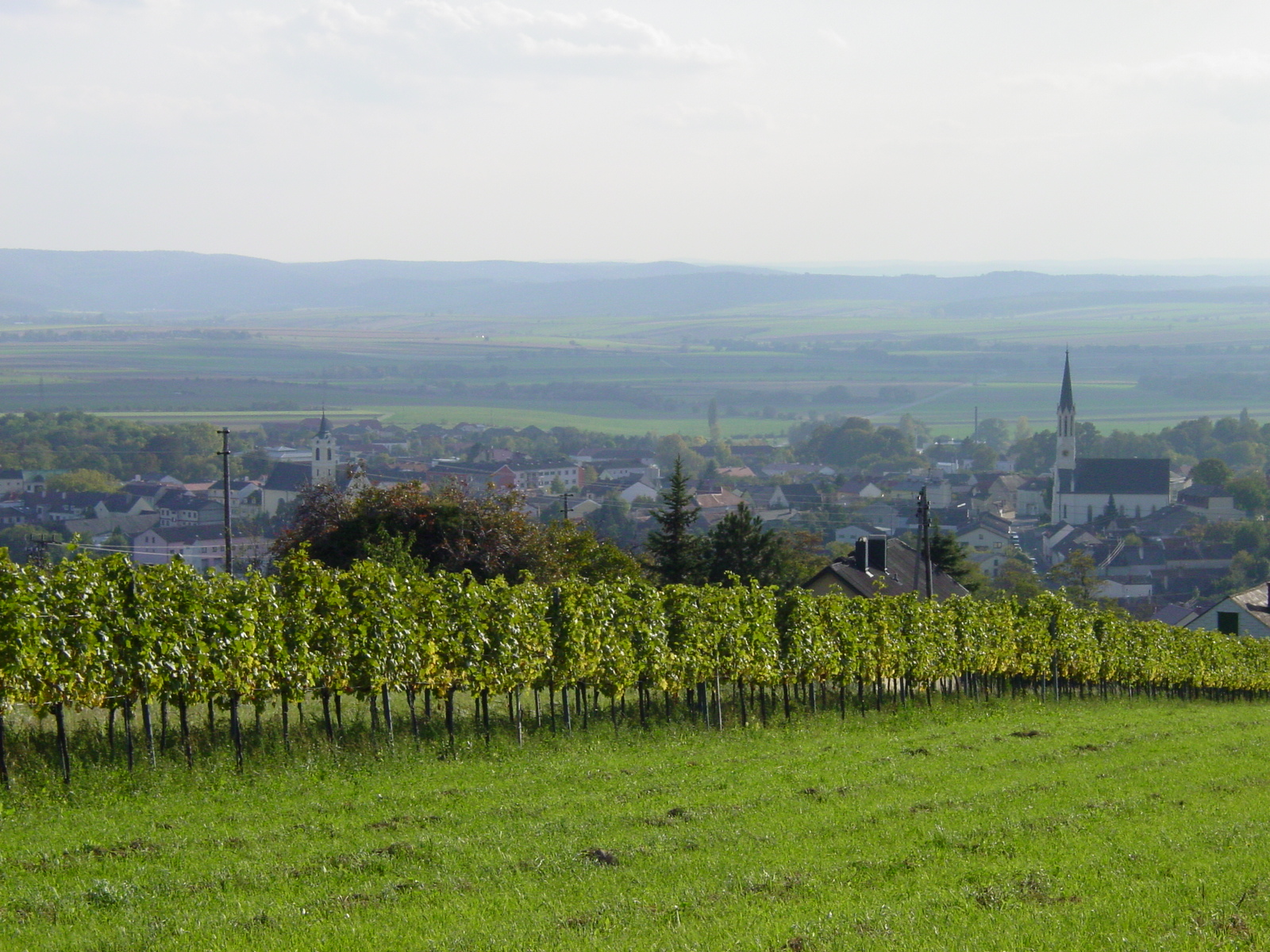 Blick vom Weingebirge über den Ort Rechnitz